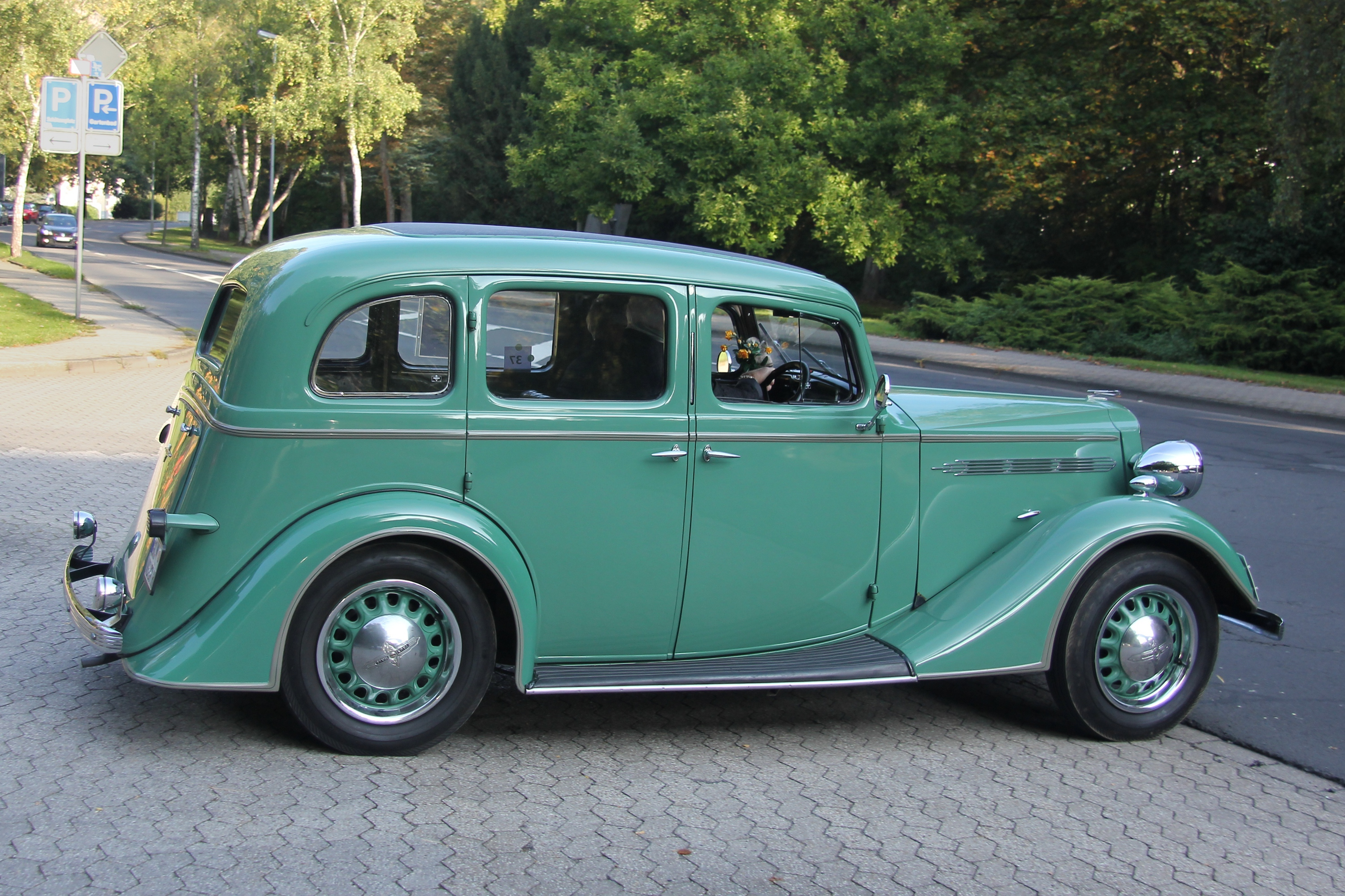 Vauxhall DX 14 HP Saloon, Baujahr 1937, bei der Moselschiefer-Classik in Mayen